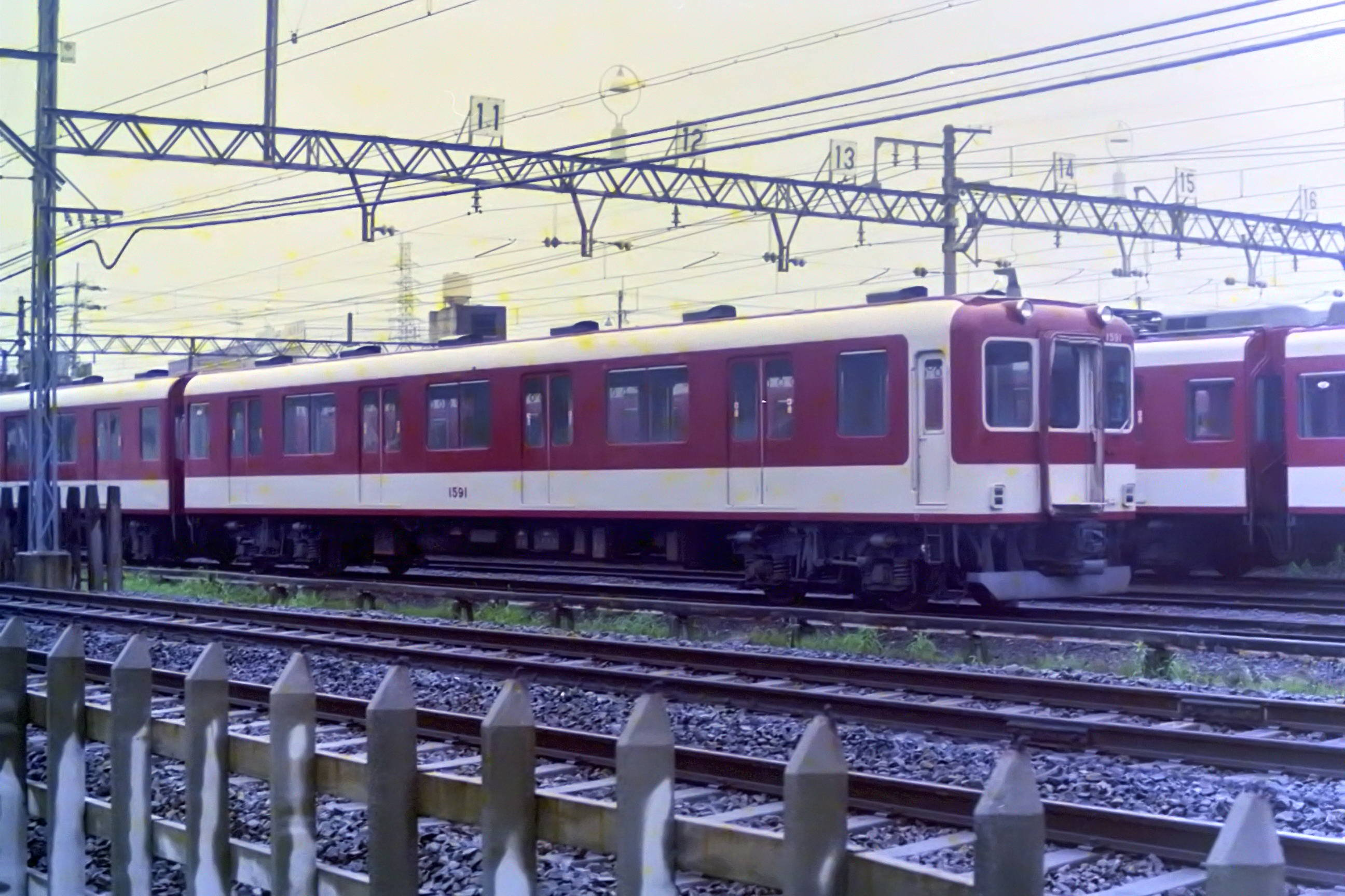 近鉄 ク1591 1987年8月 高安車庫